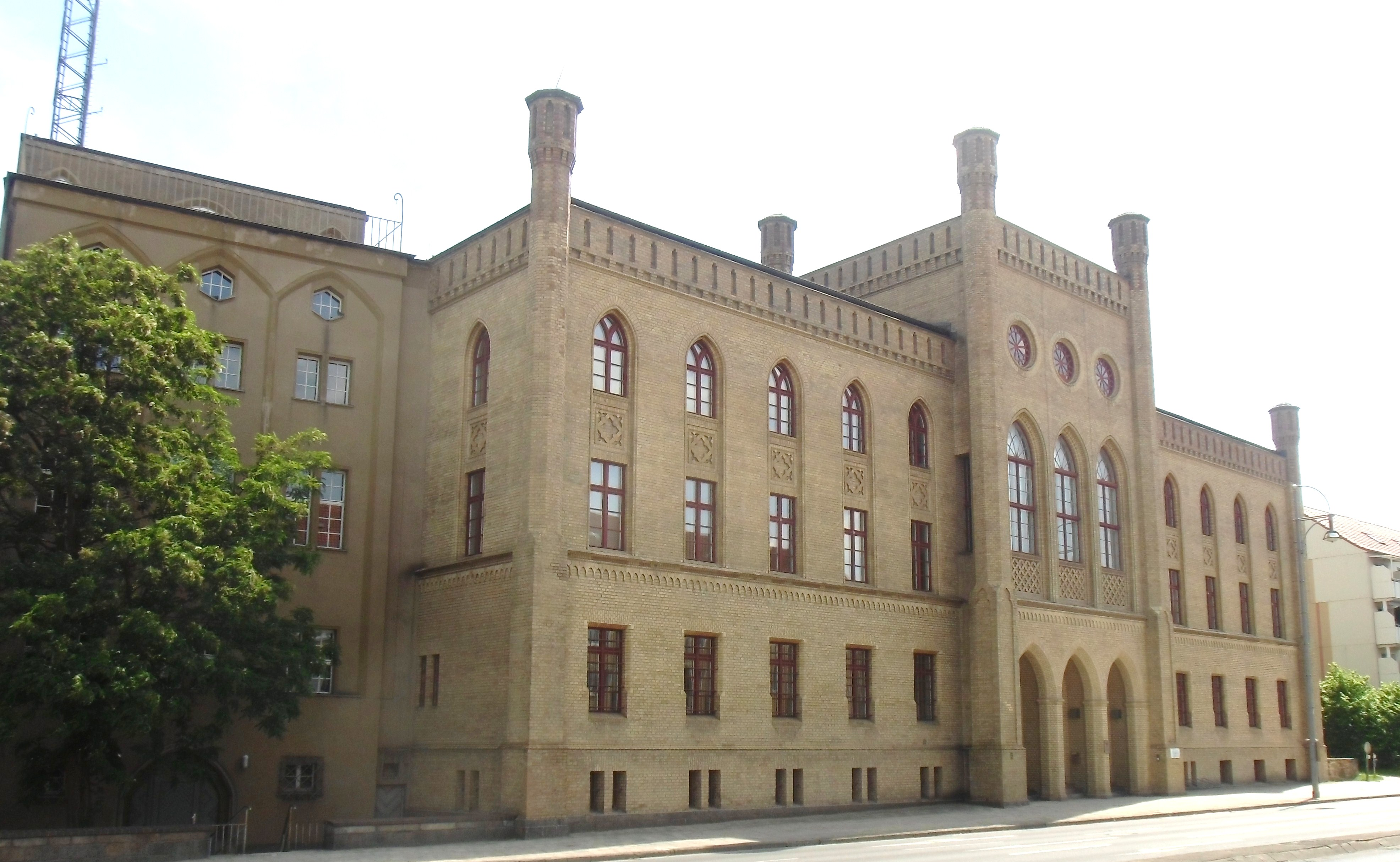 Denkmalgeschütztes Gebäude des Amtsgerichts Prenzlau